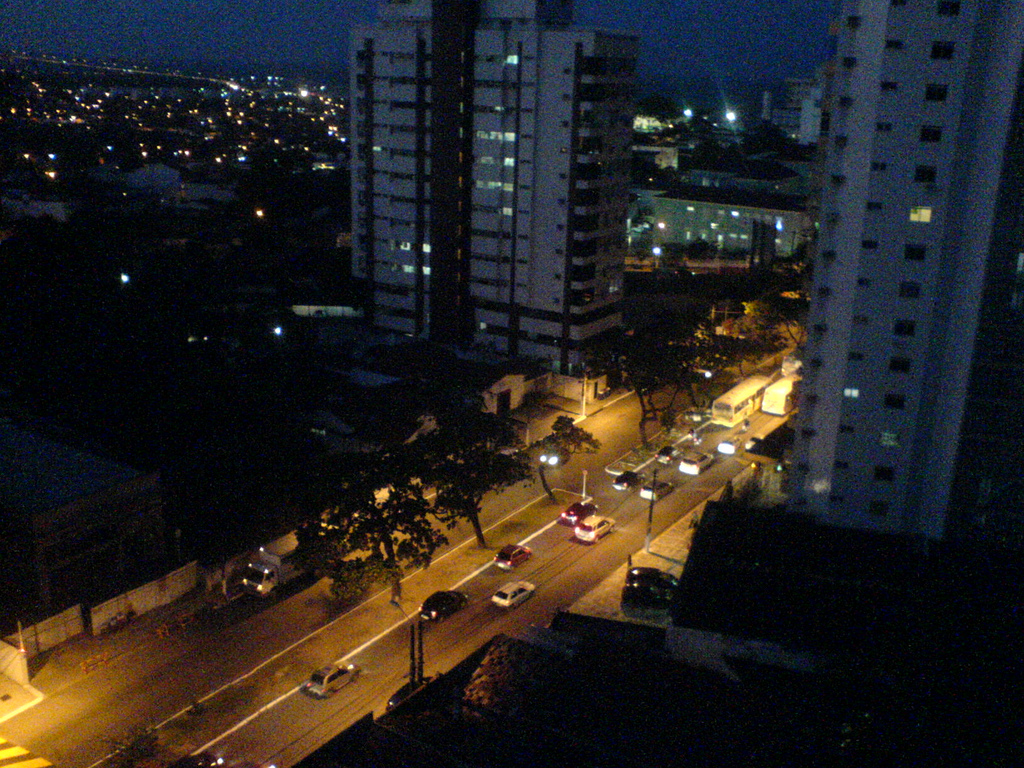 Avenida Nilo Peçanha, bairro Petrópolis, Natal - RN, Brasil.